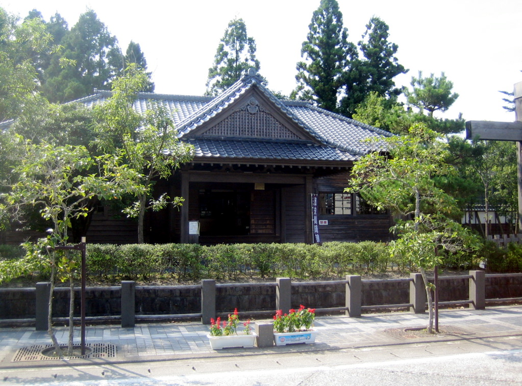 Mizusawa Prefecture Memorial